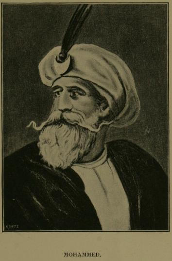 Muhammad